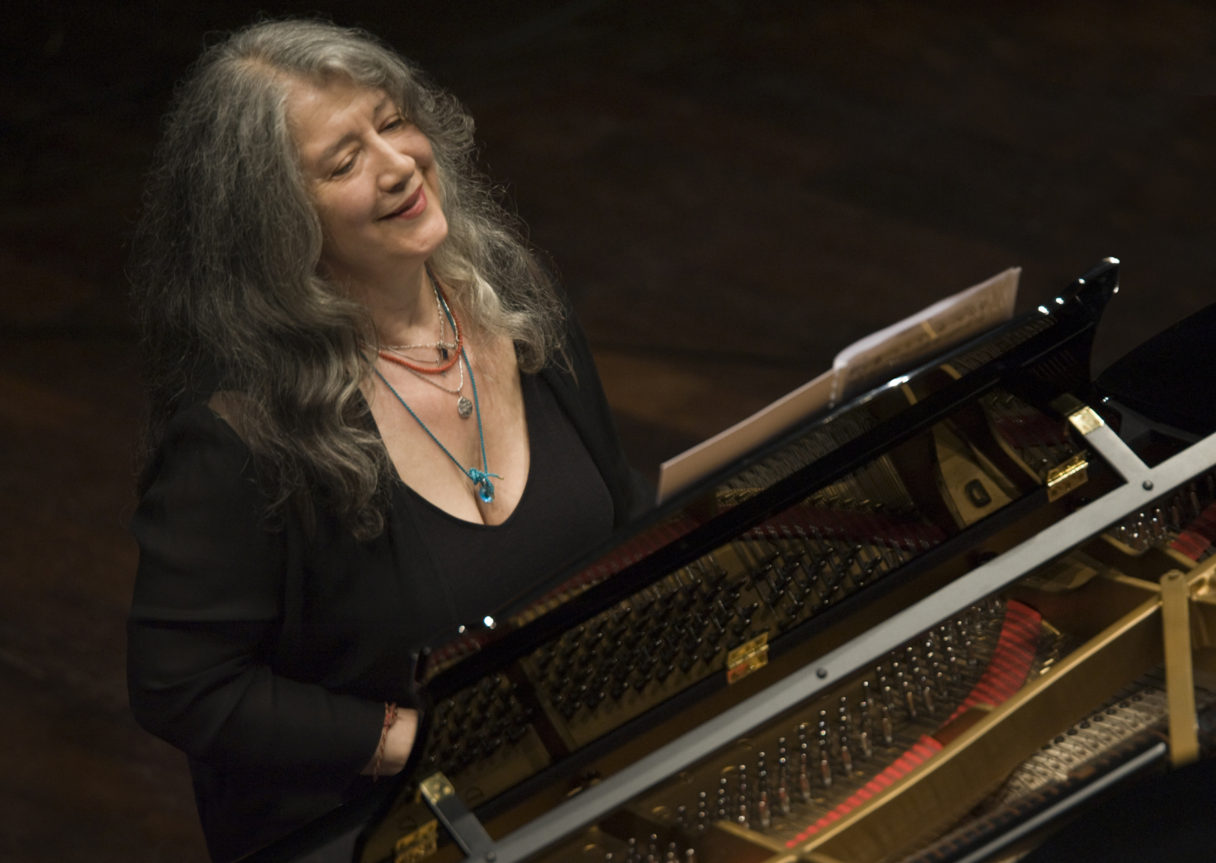 Martha Argerich en el Correo Central, foto Adriano Heitman